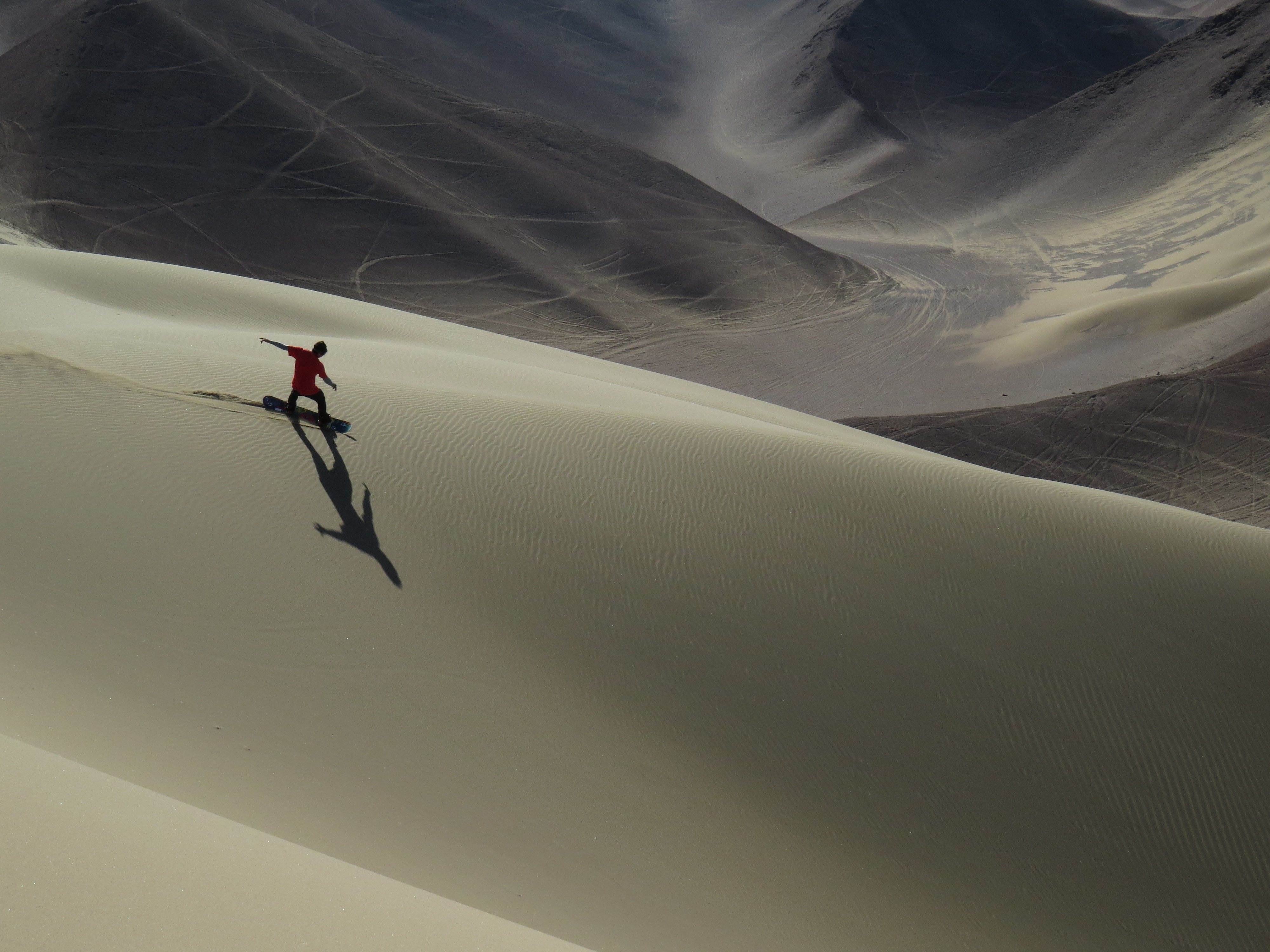 Sandboarding Iquique Chile 2016 Raider: Cristian Calcagno